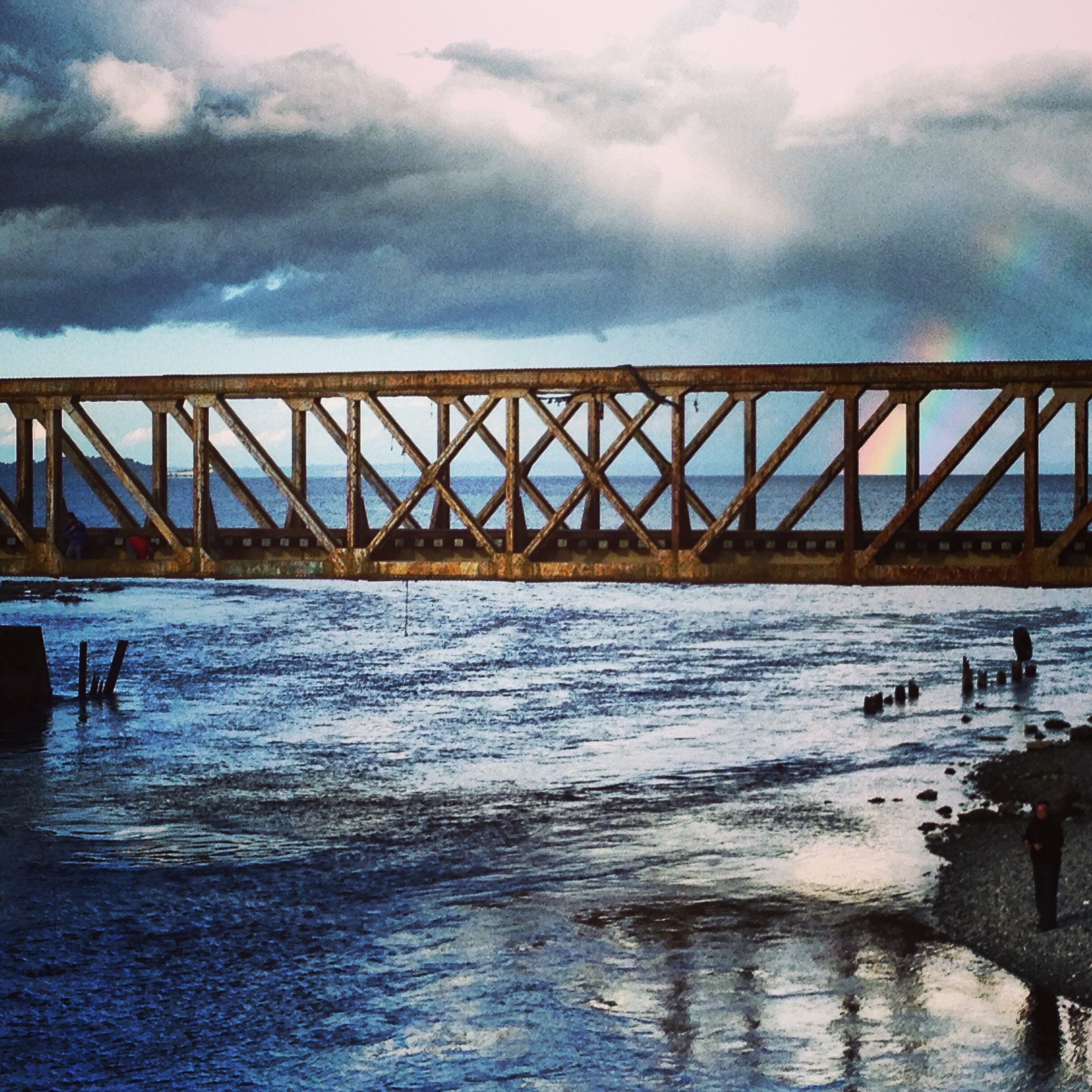 Chile . Lago Llanquihue.